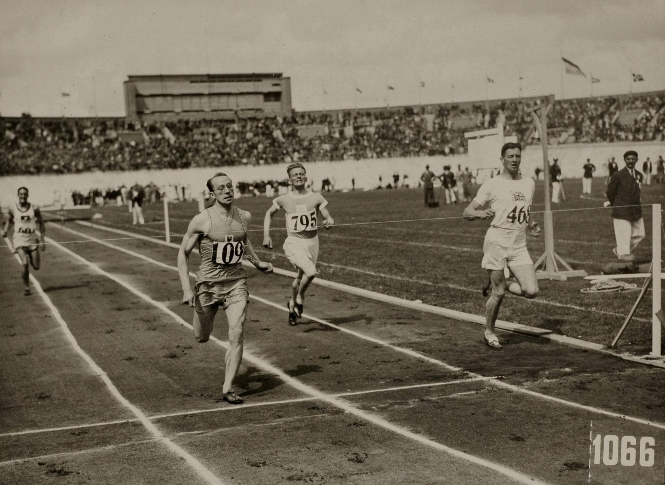 Sport. Olympische Spelen 1928 Amsterdam, Nederland : De Fransman R. Viel wint voor de Brit Livingstone Learmouth in de derde serie van de 400 m horden.